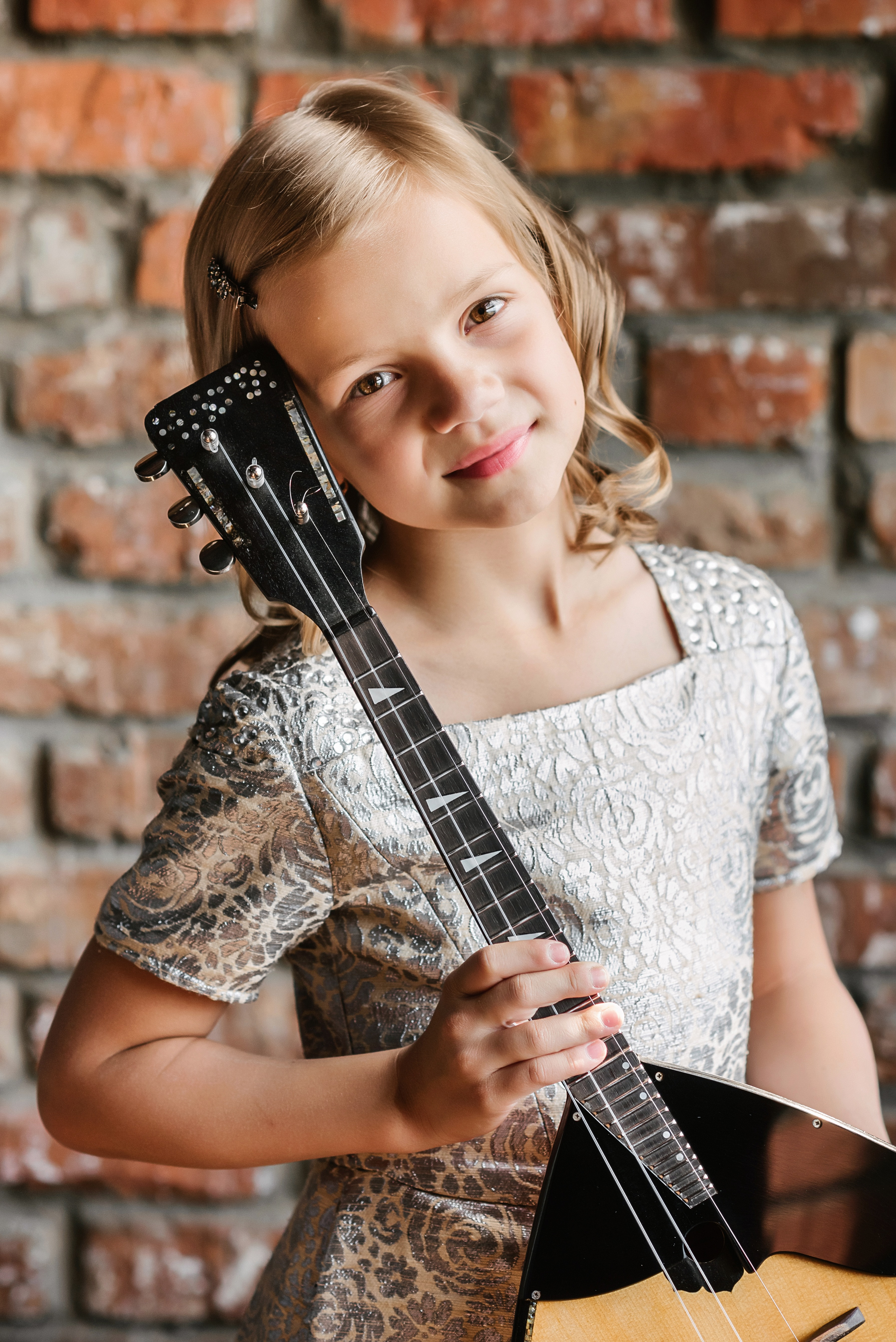 Анастасия Тюрина - музыкант, балалаечница